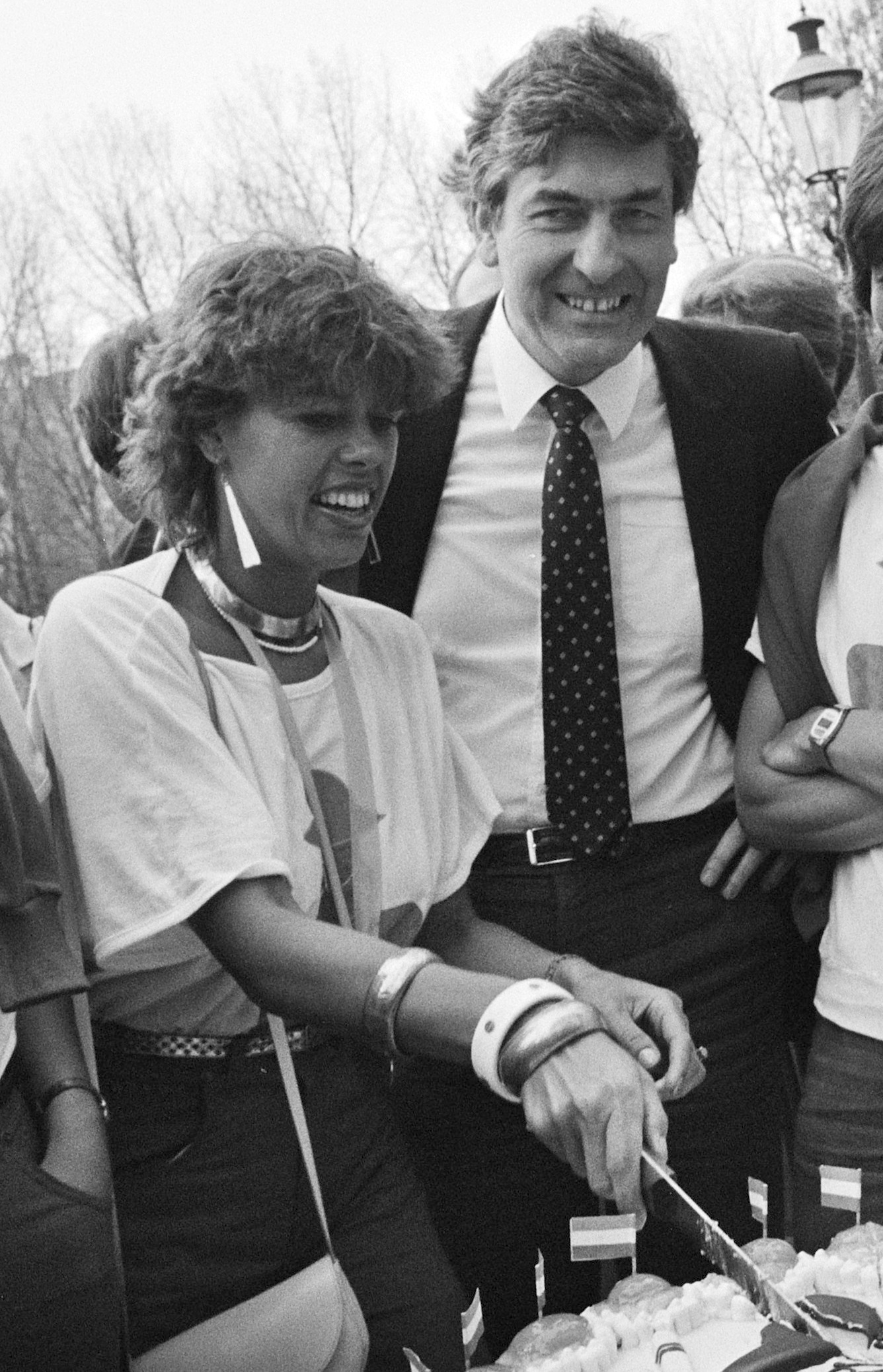 Ontvangst van de dameshockeyploeg door premier Lubbers op het Catshuis na het behalen van de wereldbeker. Margriet Zegers snijdt de taart aan